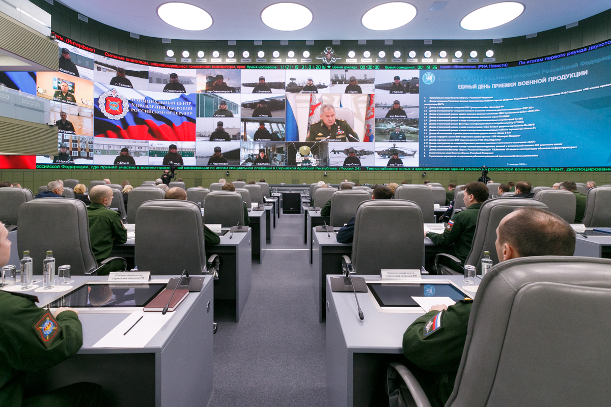 Единый день приемки